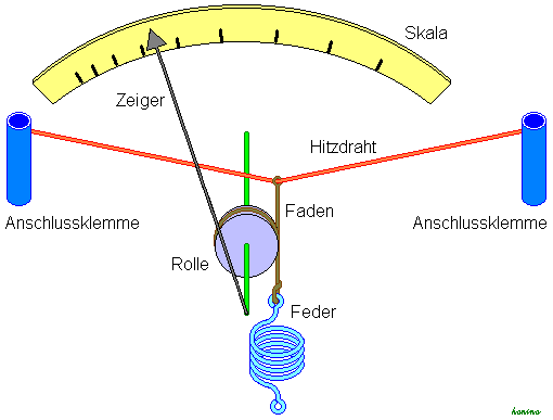 Funktion eines Hitzdrahtinstruments